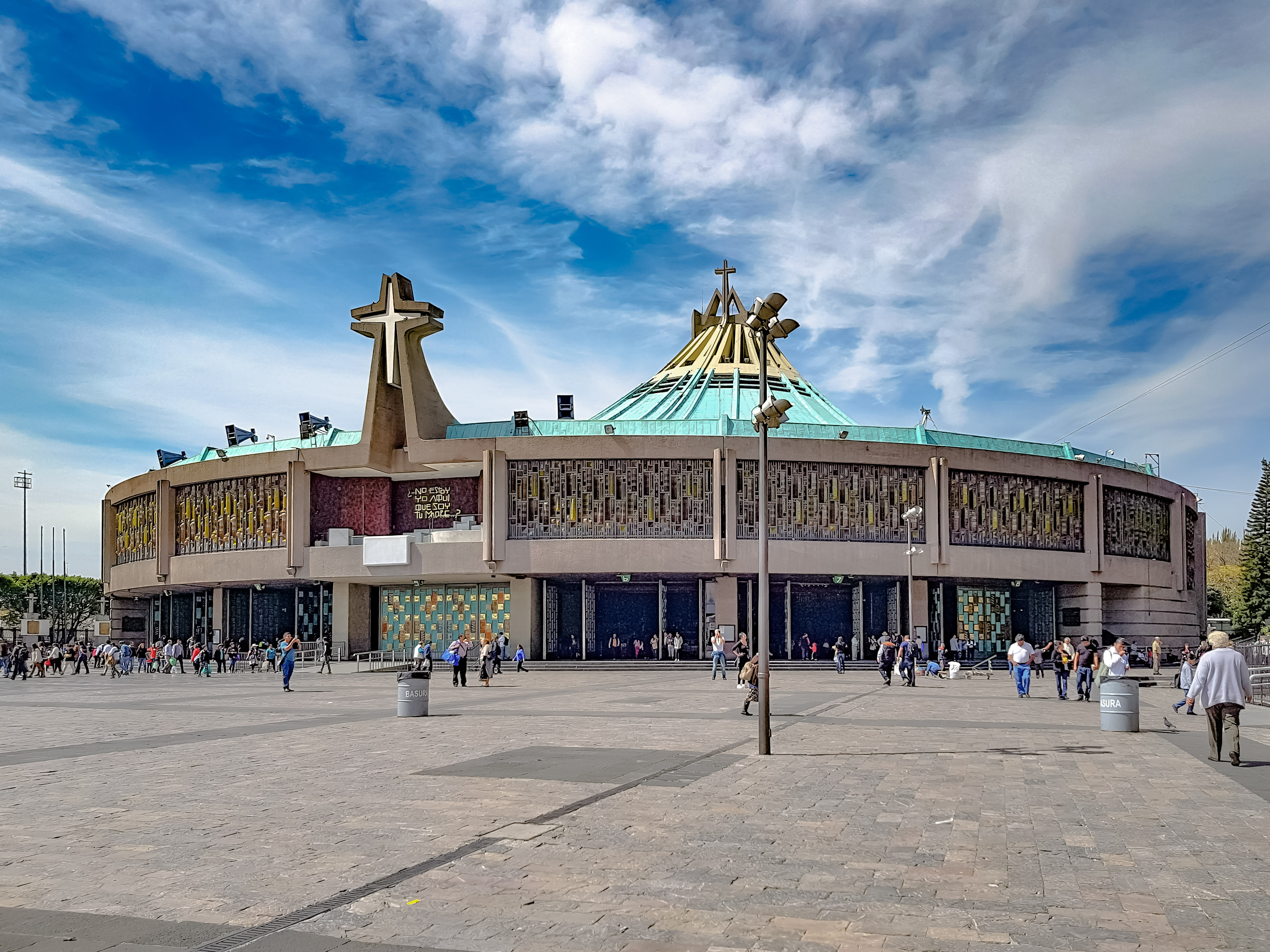 Dedicado a la Virgen María en su advocación de Guadalupe, ubicado al pie del Cerro del Tepeyac en la alcaldía Gustavo A. Madero de la Ciudad de México